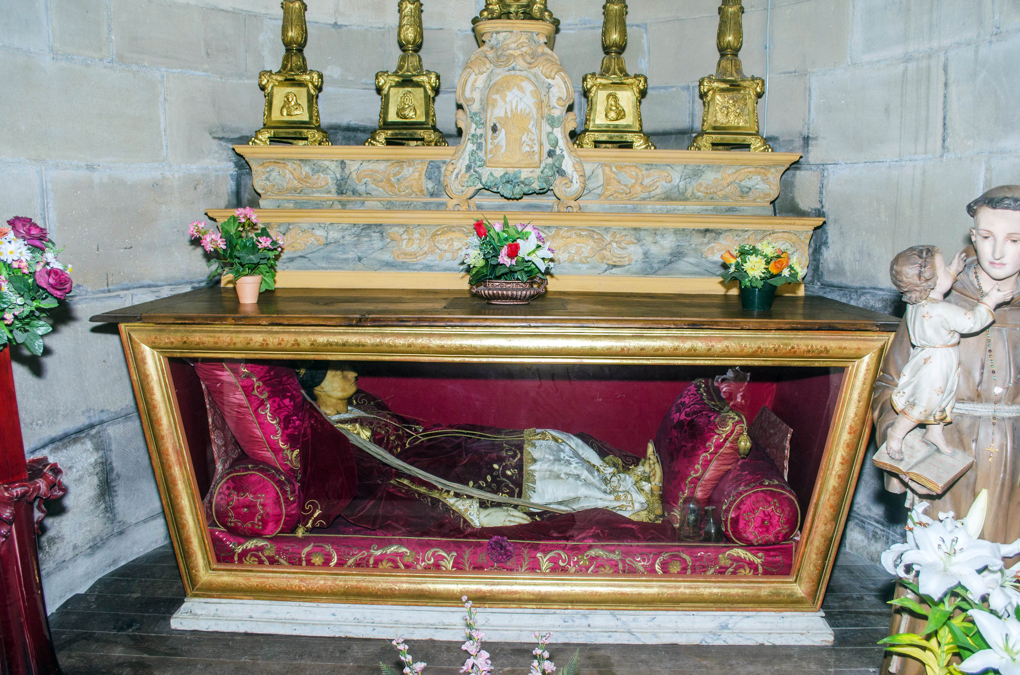 Valence, Drôme, France. Cathédral Saint-Apollinaire, autel, chapelle du déambulatoire.